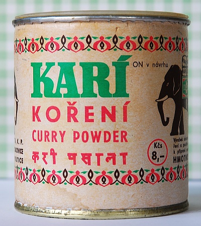 Dóza s kořením Kari prodávaná pro domácí spotřebitele v Československu.